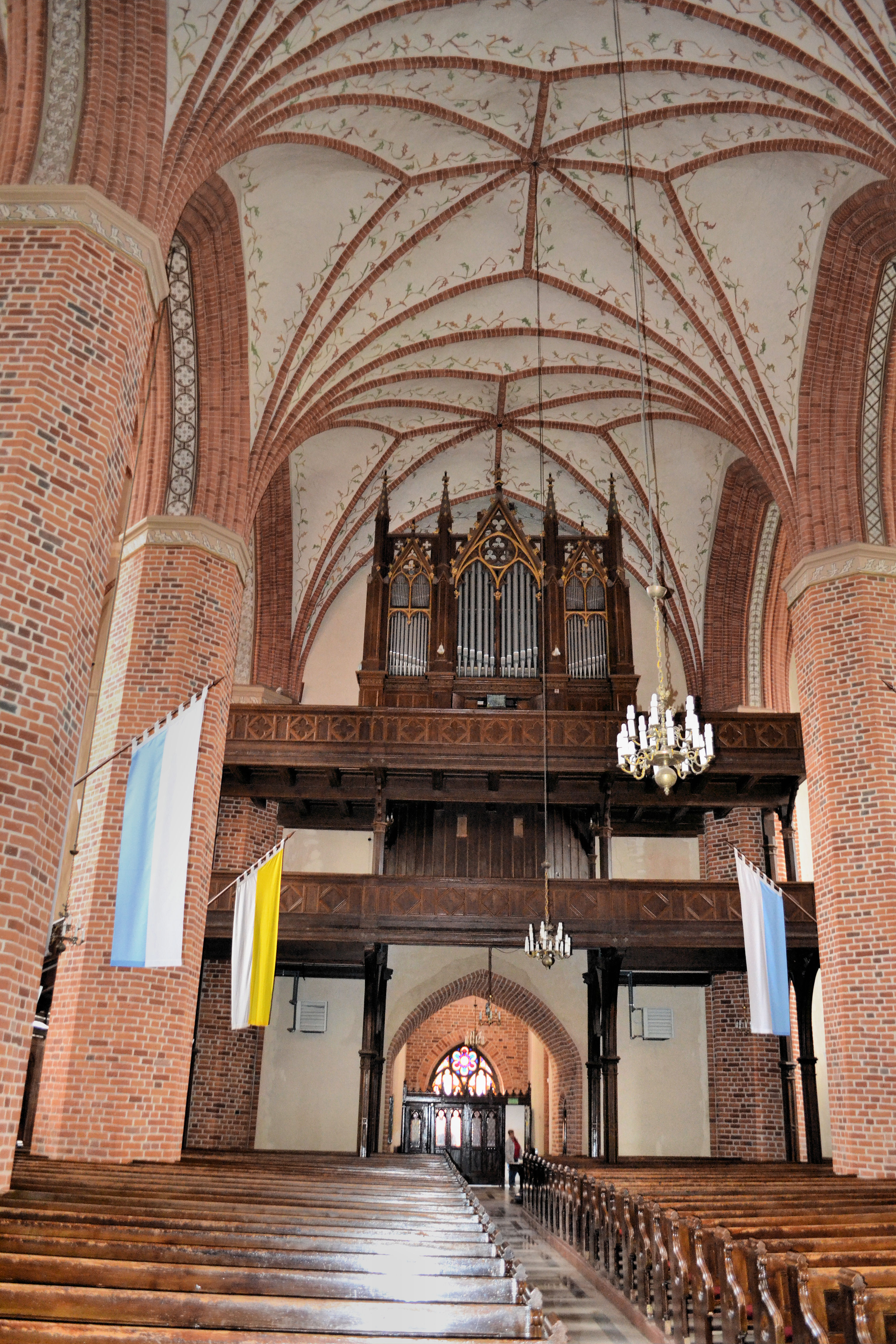 kościół Macierzyństwa NMP Trzebiatów